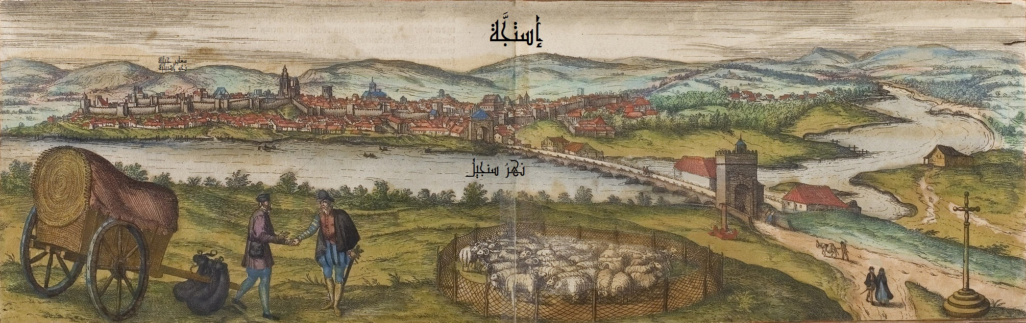 نسخة مُعرَّبة عن مُخطط لِمدينة إستجَّة في الأندلُس.